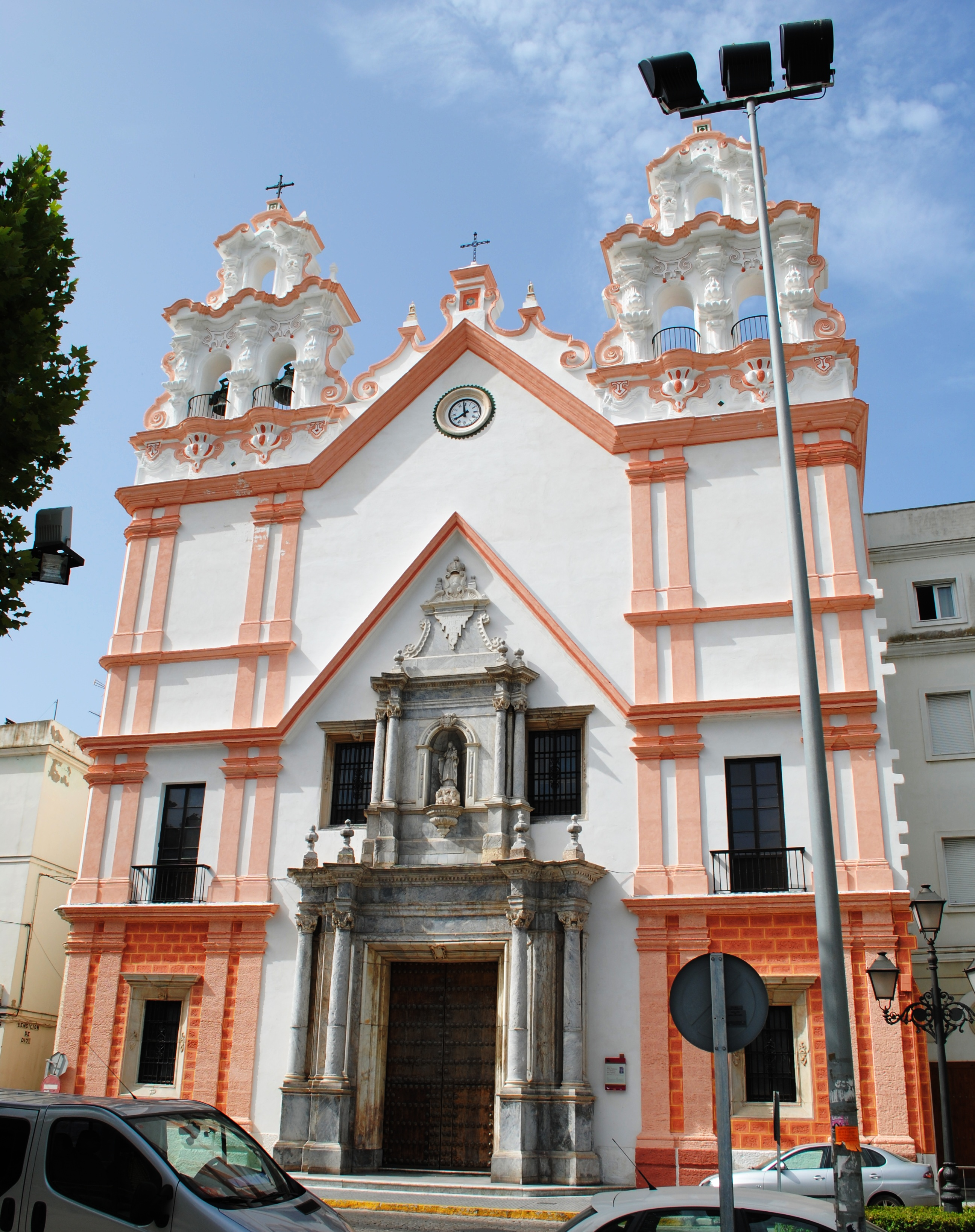 Iglesia de Nuestra Señora del Carmen y Santa Teresa, Cádiz. Su obra se dilato desde el 1743, seis años más tarde de la llegada de la Orden Carmelita a Cádiz, al 1762, y fueron dirigidas por el alarife José Bolaños. Con planta de cruz latina. La nave central es más alta que las laterales que están configuradas por numerosas capillas de patronato. La nave principal se cubre con bóveda de cañón y en el crucero hay una cúpula gallonada sobre pechinas. Sus retablos son de madera sobredorada de estilo rococó entre ellos sobresale el retablo de la capilla mayor, del siglo XVIII, con tres calles y cuerpos. En el retablo central se venera, bajo un baldaquino, la imagen de la Virgen del Carmen. La fachada es muy esbelta, con tres cuerpos con pilastras adosadas, dejando grandes espacios limpios de decoración, ésta se concentra en la portada de mármol, con dos cuerpos de columnas de orden jónico y guirnaldas de flores. Son dignas de mención las dos espadañas que coronan la fachada, donde se muestra toda la fantasía de la decoración barroca.